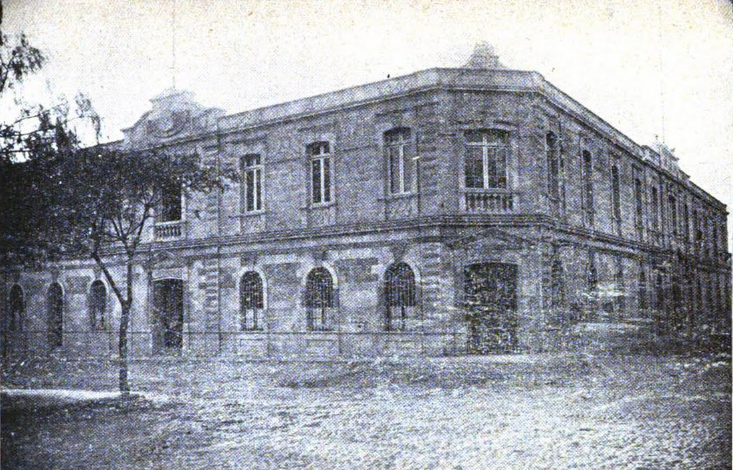 Edificio de la intendencia, Corte de Apelaciones, Juzgado de Letras y administración principal de Correos, Tacna, Chile, 1913. Ubicada en la intersección de las calles Blondell y Coronel Inclán.